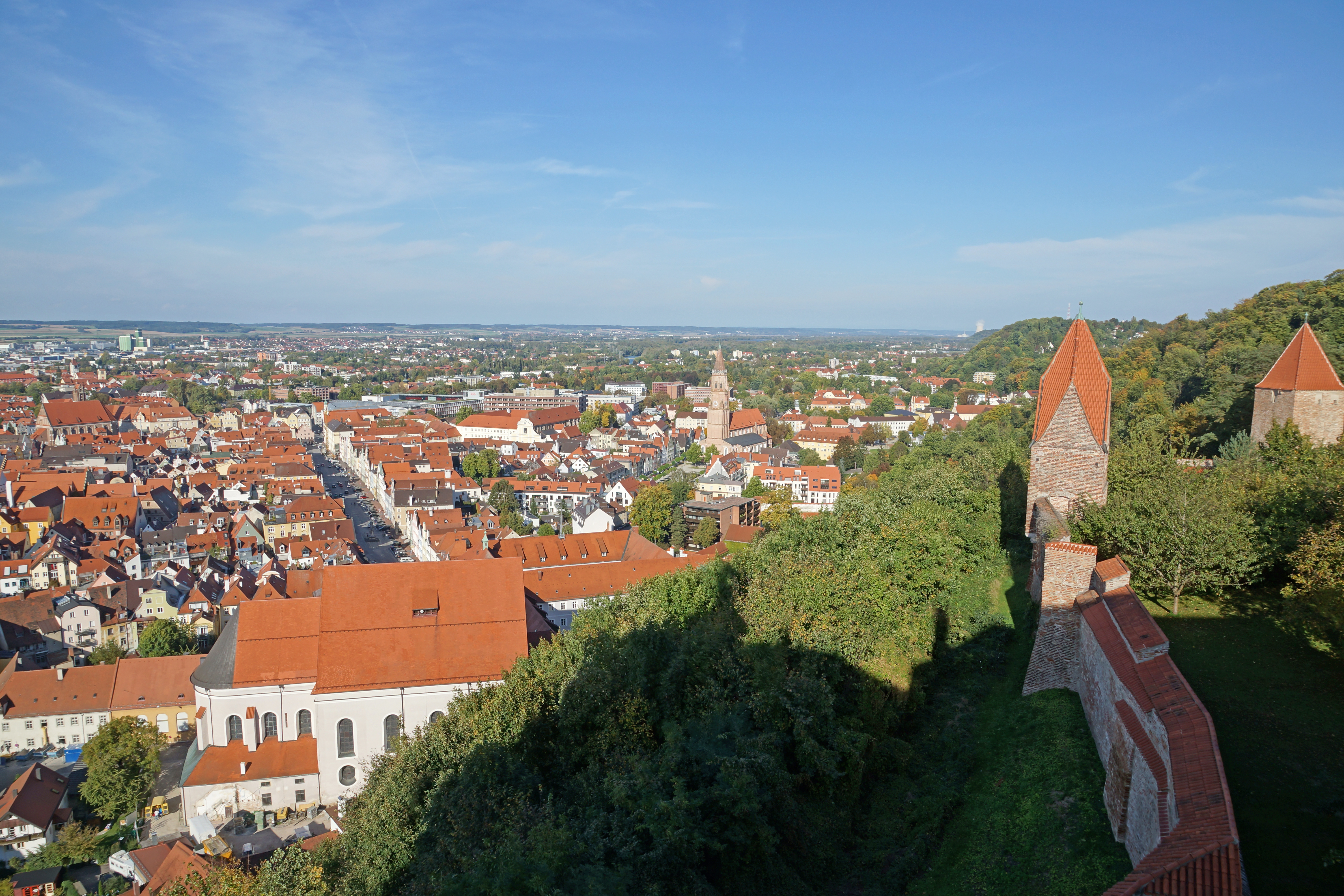 2012-10-06 Landshut 067 Burg Trausnitz, Altstadt